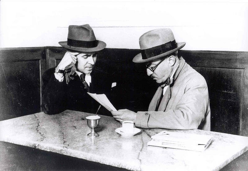 Fernando Pessoa com Costa Brochado no Café Martinho da Arcada, Praça do Comércio, Lisboa.